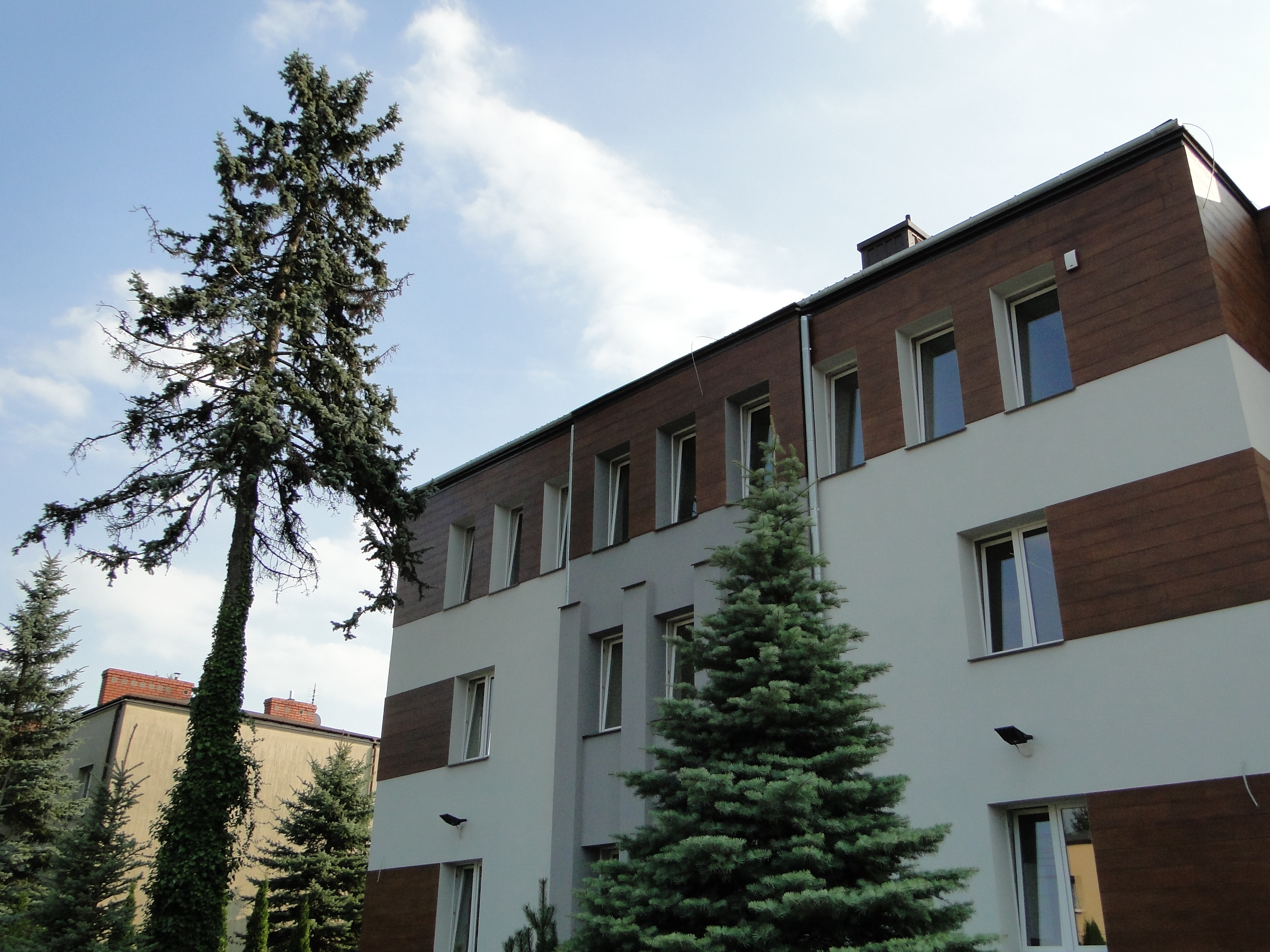 Budynek przy ul. Raszyńskiej 34 w Michałowicach. Obecna siedziba Biblioteki Publicznej Gminy Michałowice.